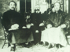 1911年12月，武昌起义后，南北议和代表唐绍仪（左）、伍廷芳（右）和英国商人李德立合影。这张照片是由李德立的孙女、英国友人多萝西·卢西夫人(Dorothy Lucy)提供的。